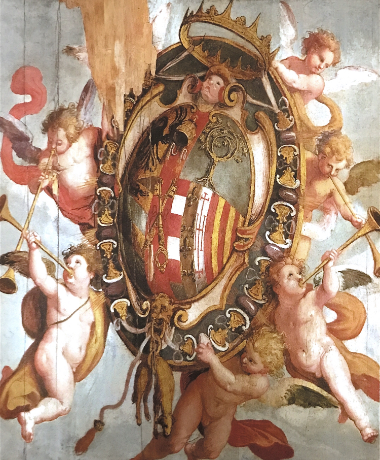 stemma palazzo ducale senigallia